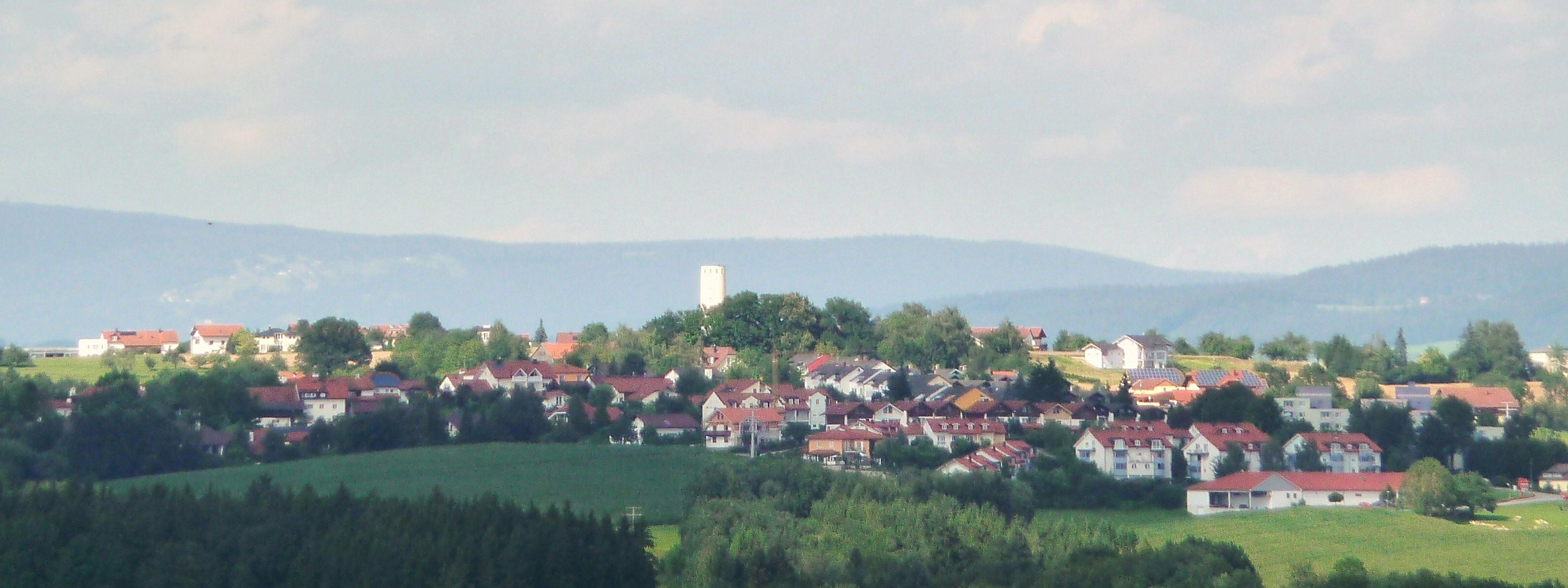 Blick über den Passauer Stadtteil Hacklberg zu dem markanten Wasserturm von Ries